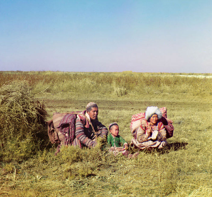 Казахи Сыр-Дарьинской области